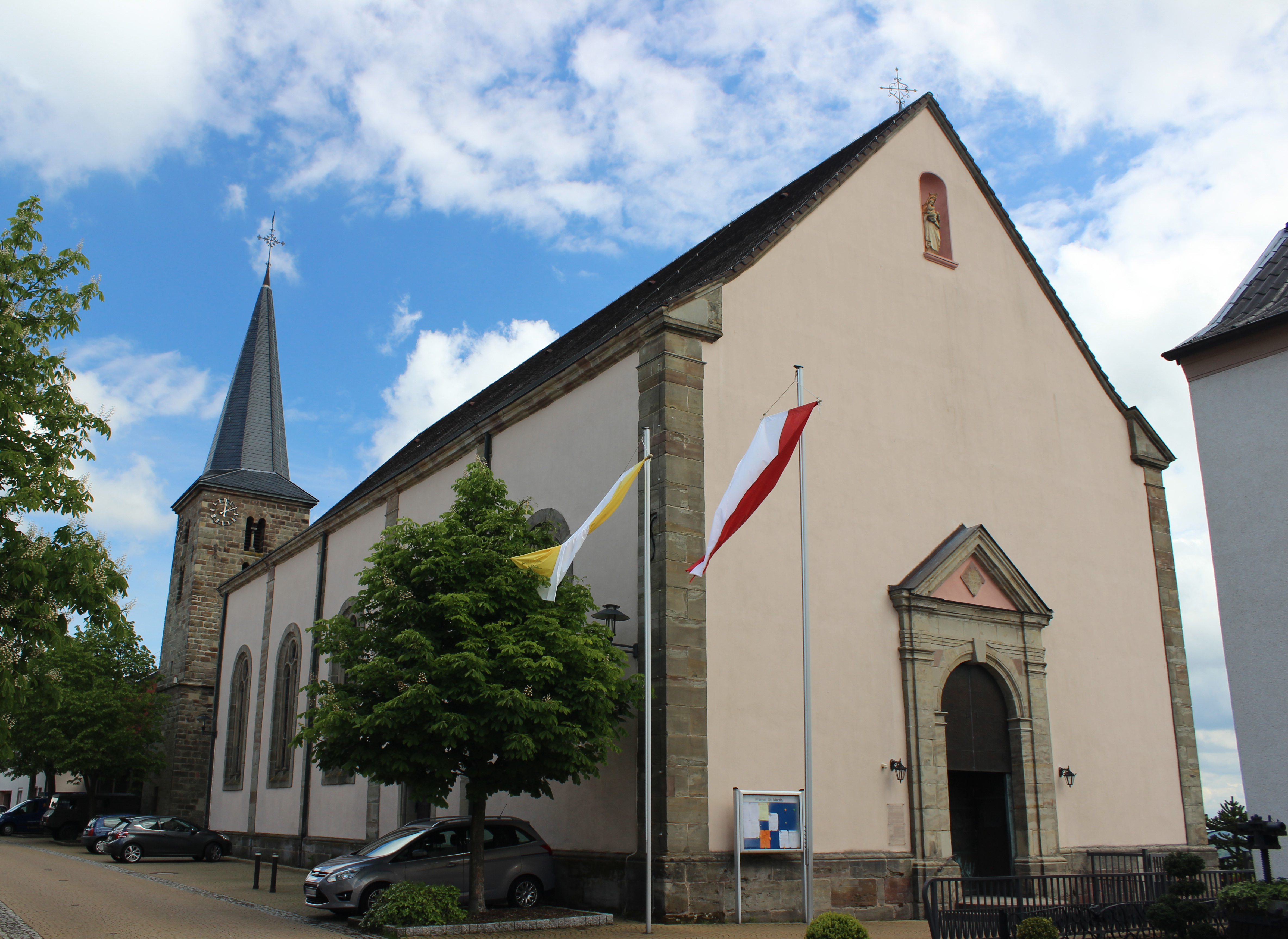 Die katholische Pfarrkirche St. Martin in Berus, einem Ortsteil der Gemeinde Überherrn, Landkreis Saarlouis, Saarland